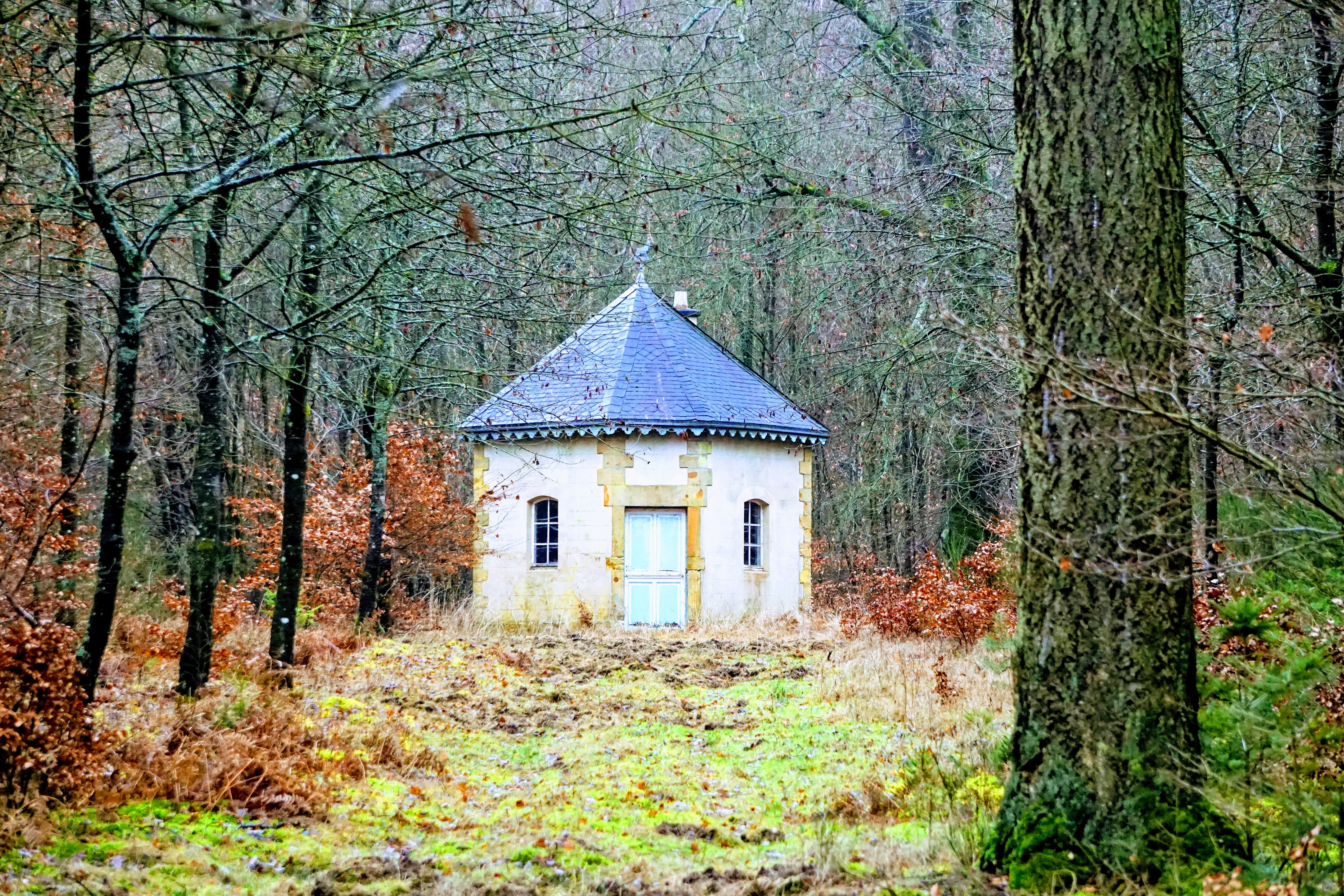 Niederanven, le pavillon du Grand-Duc Adolphe dans la forêt du Grunewald.